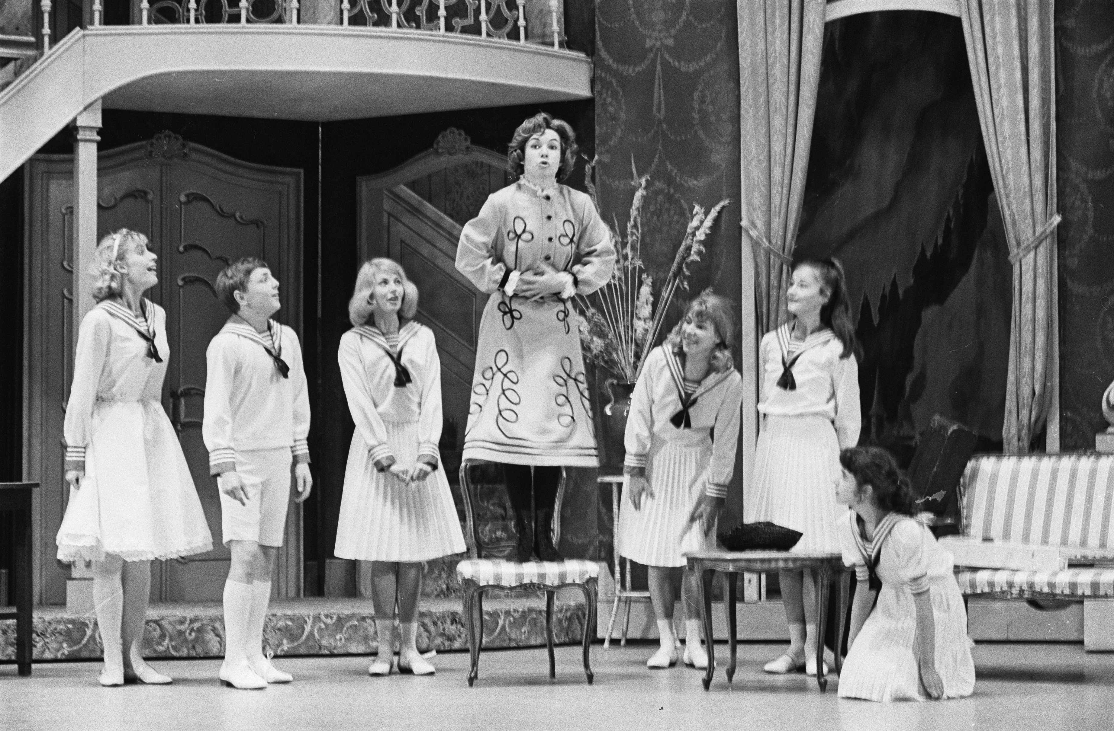 Collectie / Archief : Fotocollectie Anefo Reportage / Serie : [ onbekend ] Beschrijving : Musical "The Sound of Music" , repetitie in Carré, Mieke Bos als de gouvernante tijdens scene met kinderen om haar heen Datum : 22 januari 1964 Locatie : Amsterdam, Noord-Holland Trefwoorden : musicals, repetities, zangeressen Persoonsnaam : Bos, Mieke Fotograaf : Pot, Harry / Anefo Auteursrechthebbende : Nationaal Archief Materiaalsoort : Negatief (zwart/wit) Nummer archiefinventaris : bekijk toegang 2.24.01.05 Bestanddeelnummer : 915-9761